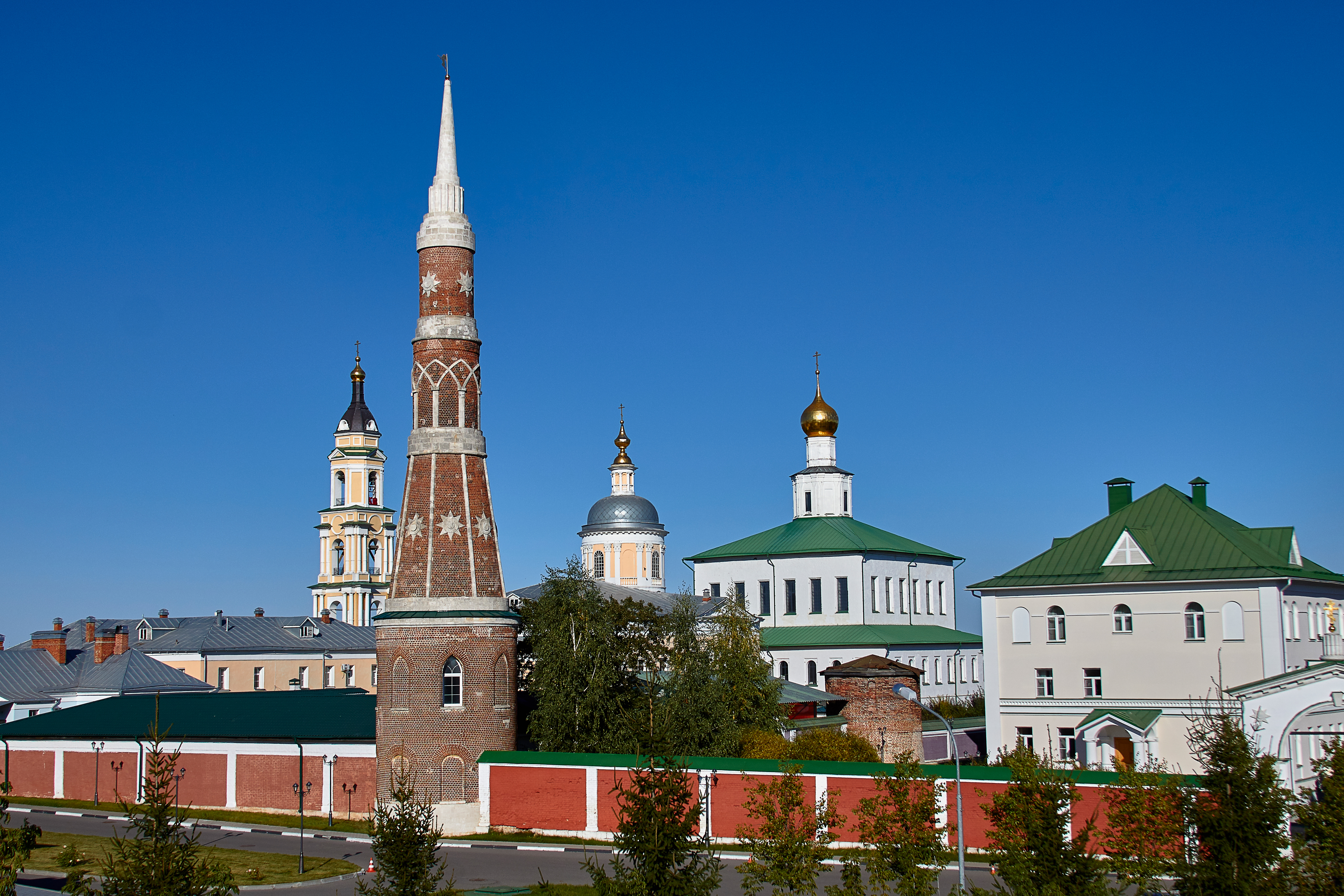 Башня западная № 7 (северная с надкладезной часовней) (даны координаты северной с часовней): улица Голутвинская, Коломна, Московская область